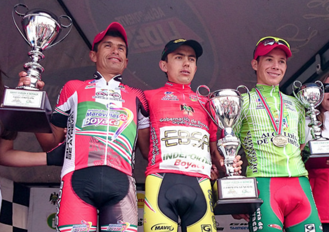 Podio de la Vuelta a Boyacá 2014 con Óscar Rivera, Fernando Camargo y Miguel Ángel López